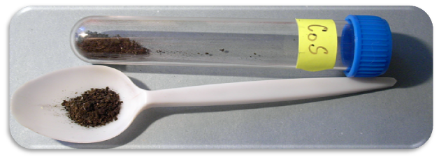 Sulfid kobaltnatý - CoS